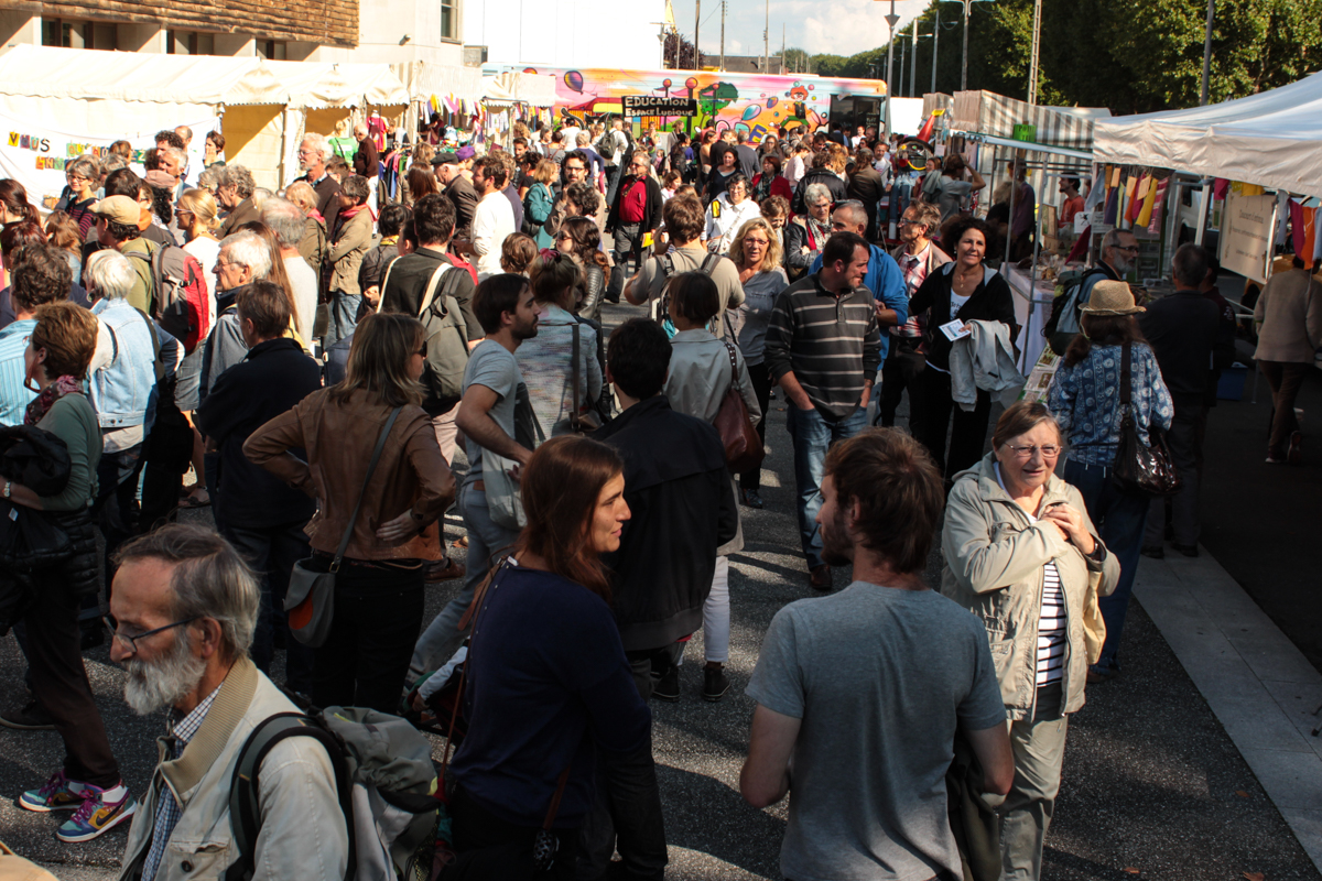 Vue du public de l'édition caennaise d'Alternatiba, le village des alternatives.